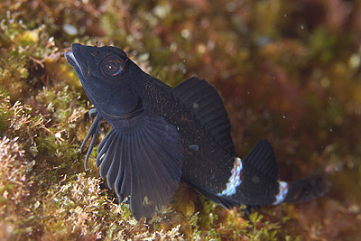 Photo by User:Mori-umi 03:01, 20 Mar 2007 (UTC). in Yaku Island which is south west part of Japan.